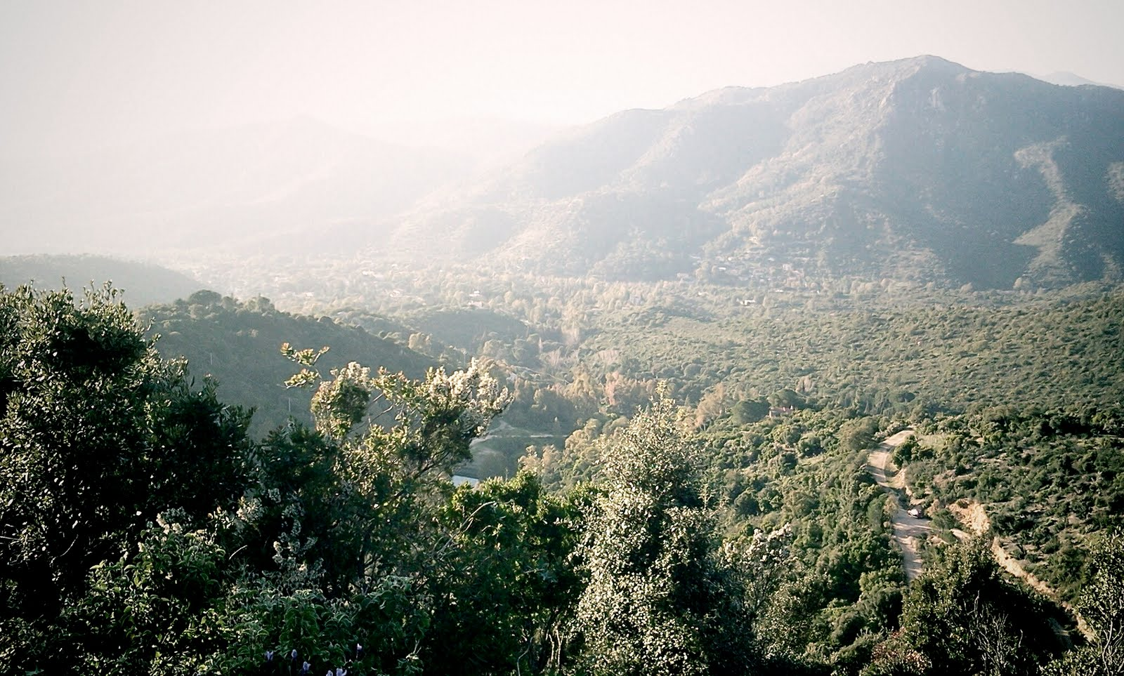 Panorama Villaggio delle Mimose